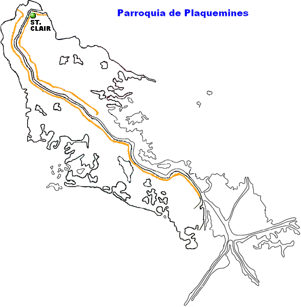 St. Clair, Louisiana.